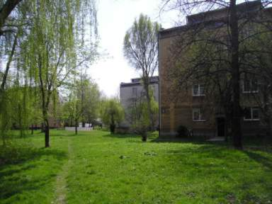 Moscice Bloki